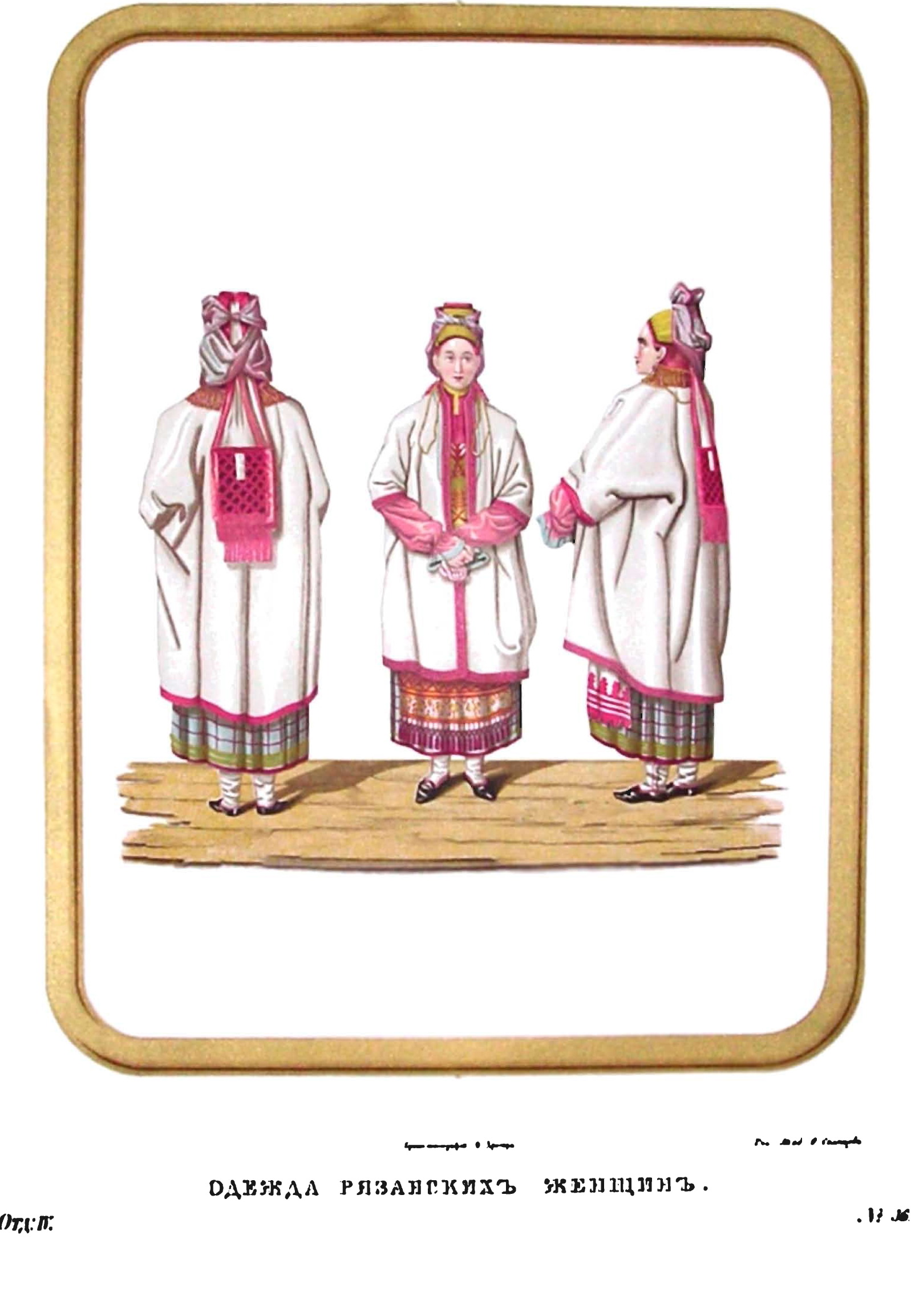 Древности Российского государства (Antiquities of Russian country), 1846—1853. Том 4. Иллюстратор — Солнцев, Фёдор Григорьевич.